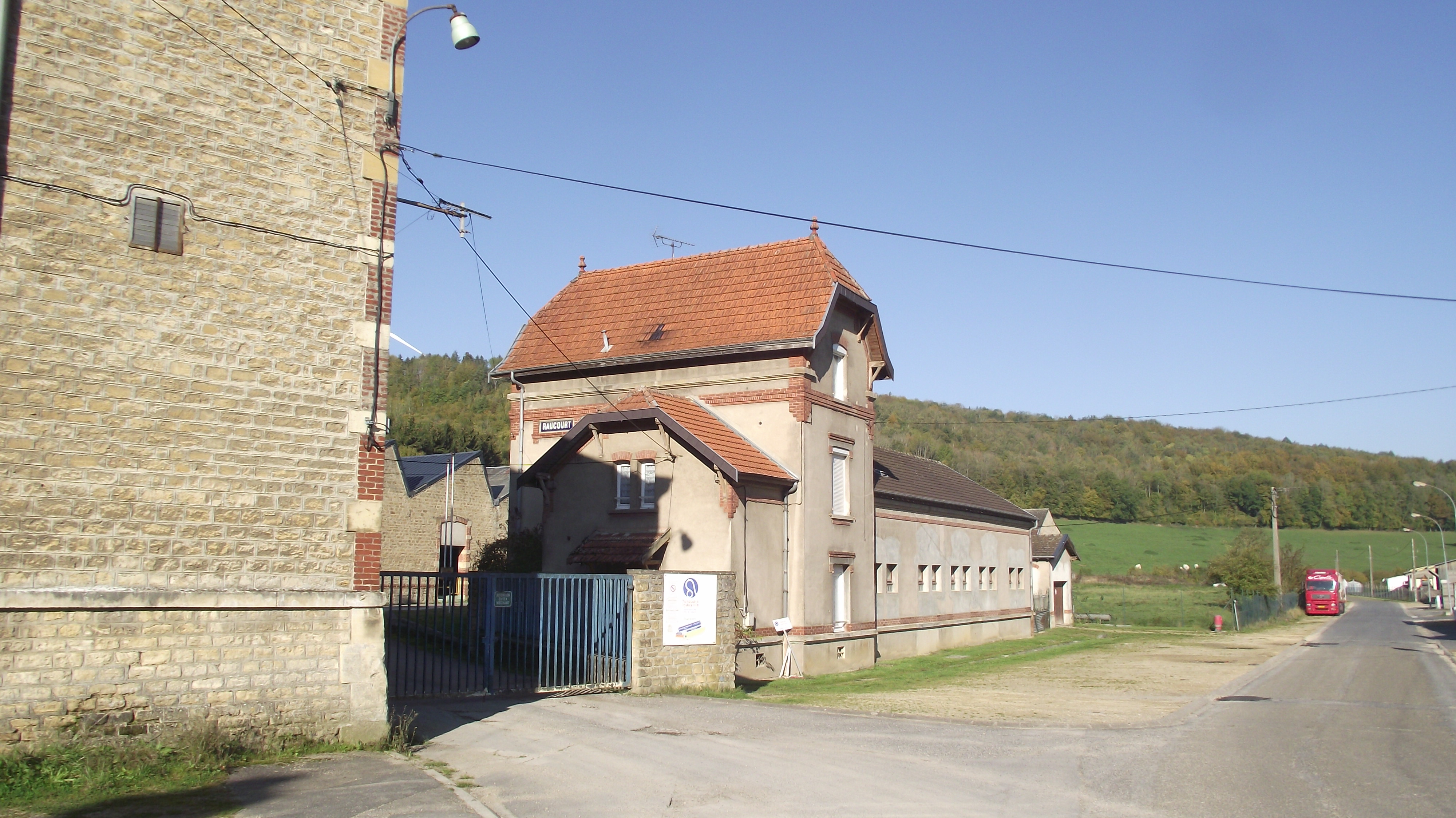 Raucourt station samen met industriecomplexen.